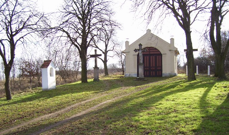 A nagyoroszi kálvária, Nógrád megye